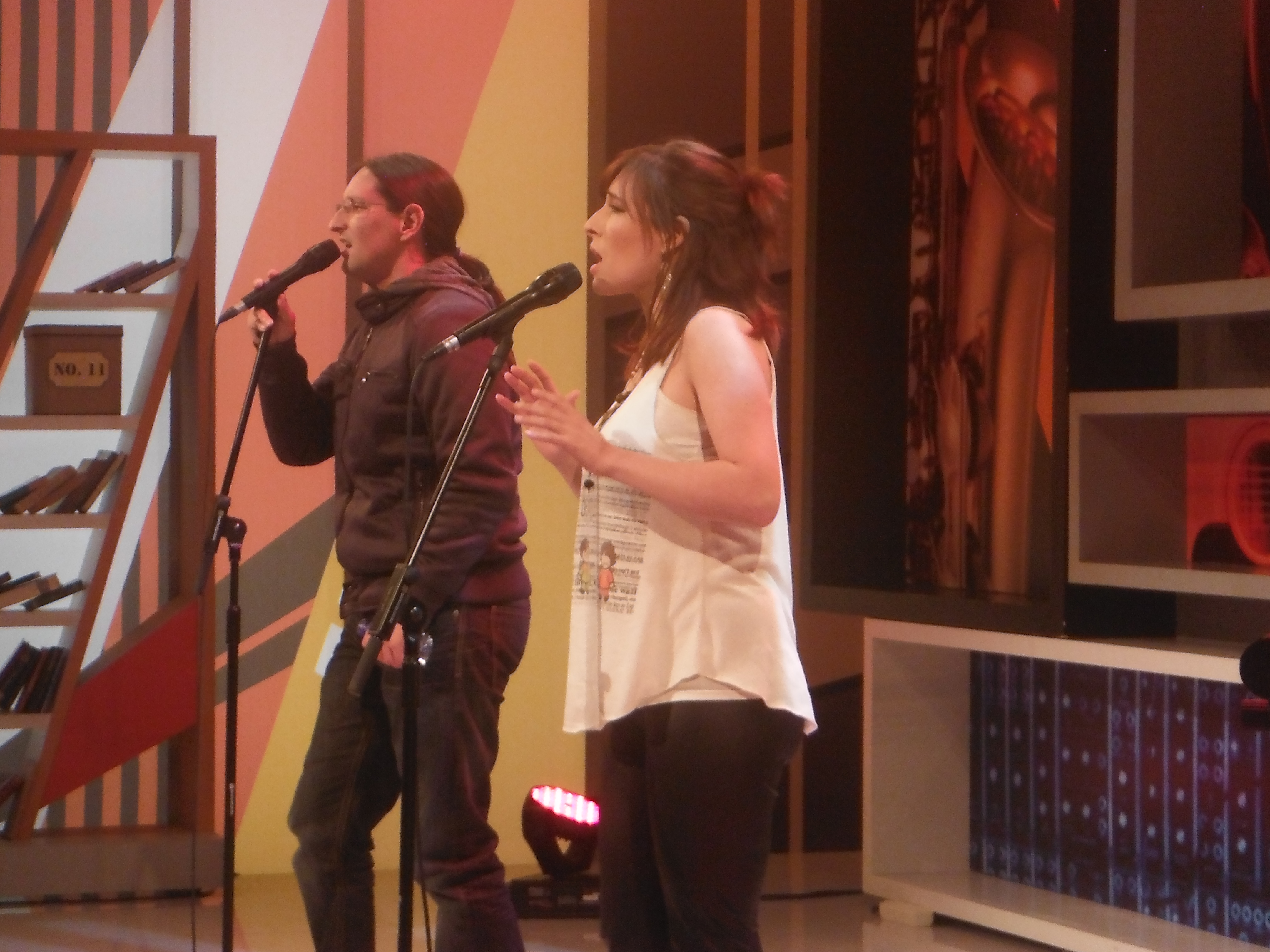 Urban Tales doing soundcheck ate rtp1 tv channel